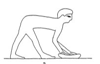 Keramikherstellung im Alten Ägypten nach einer Darstellung in einem Grab in Beni Hasan; Walken.